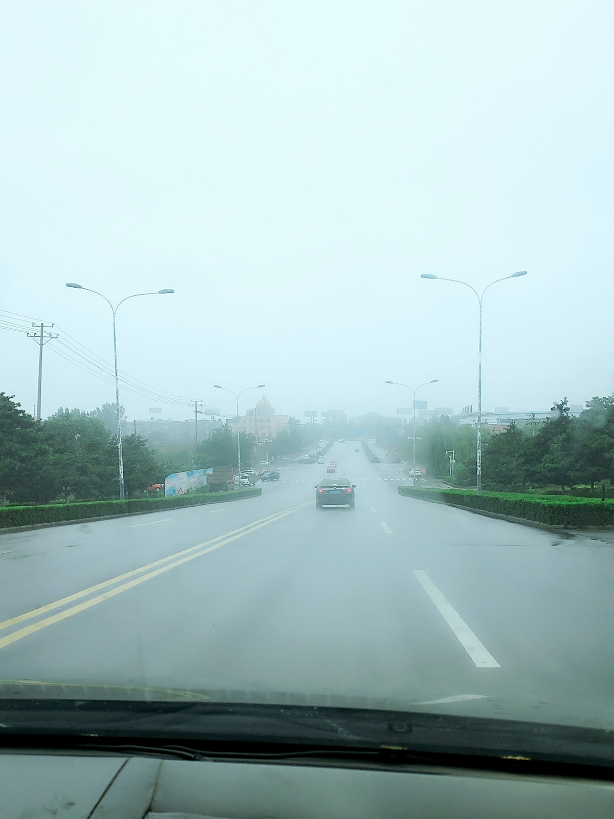 泰安市岱岳区